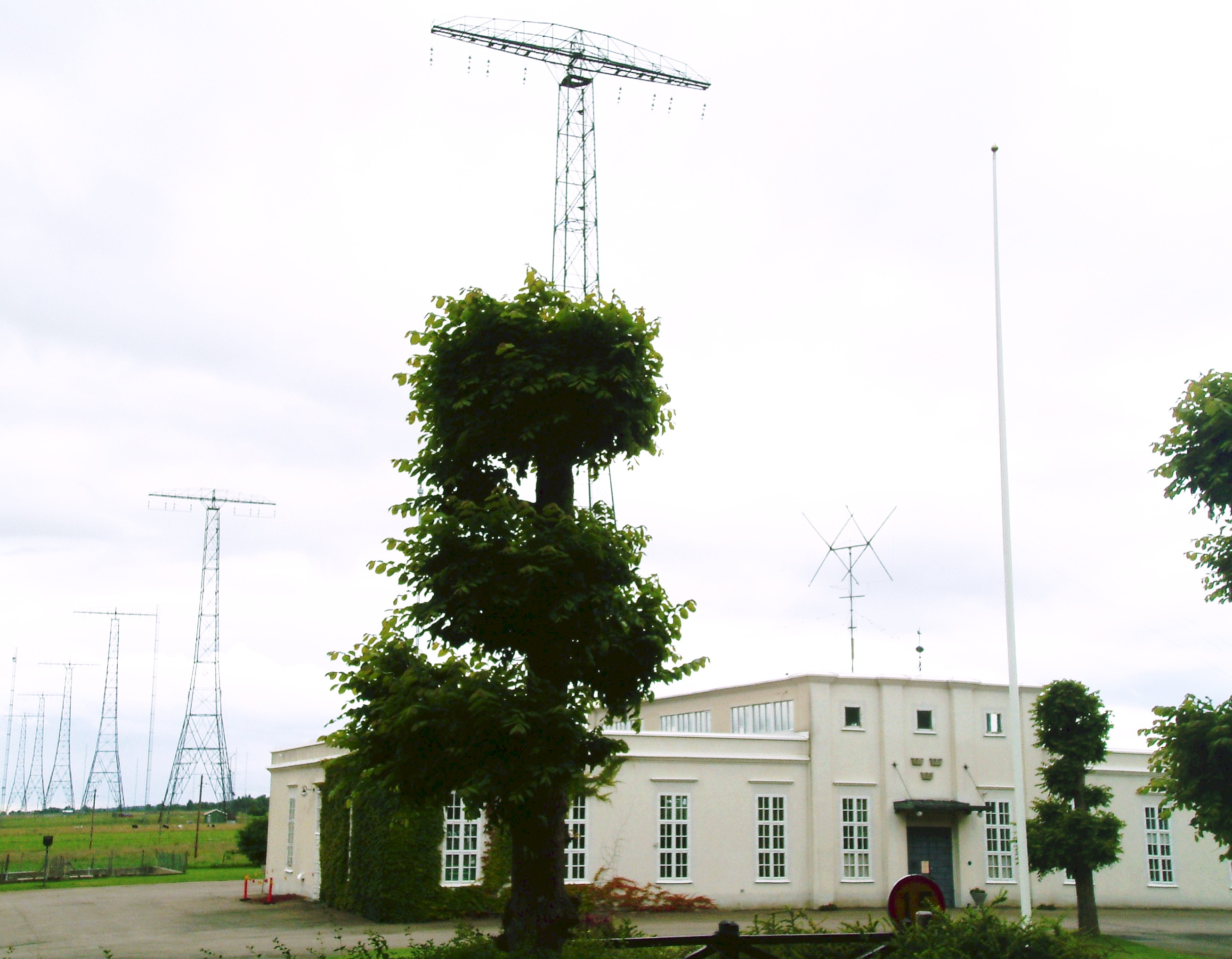 Grimeton VLF transmitter.